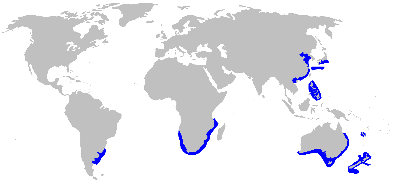 Distribution map for Etmopterus lucifer